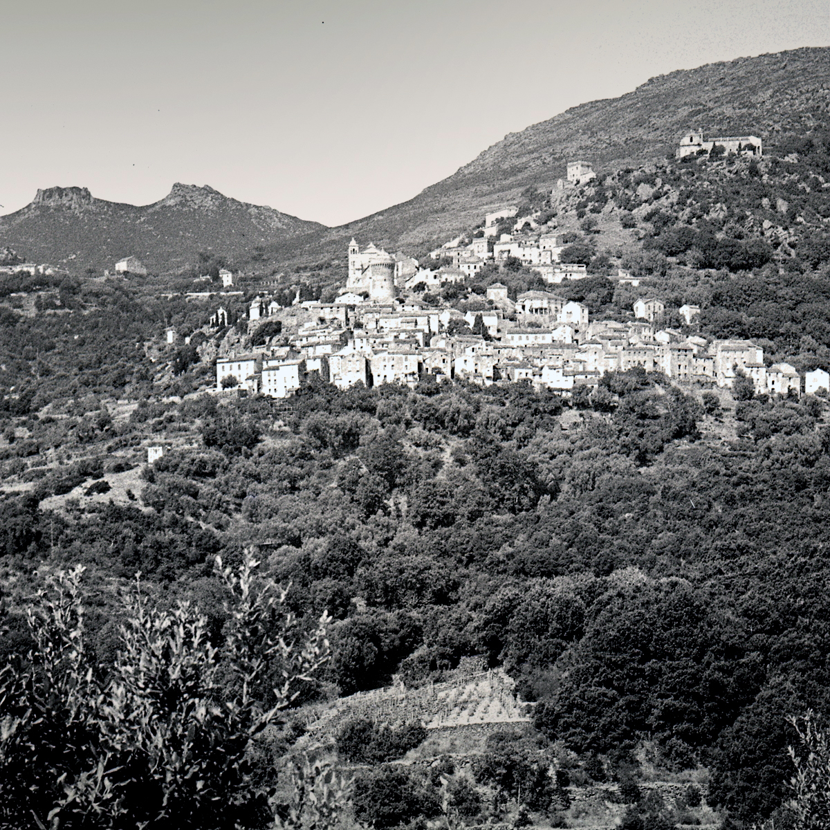 Rogliano, Cap Corse (Corse) - Bettolacce au début du XXe siècle.